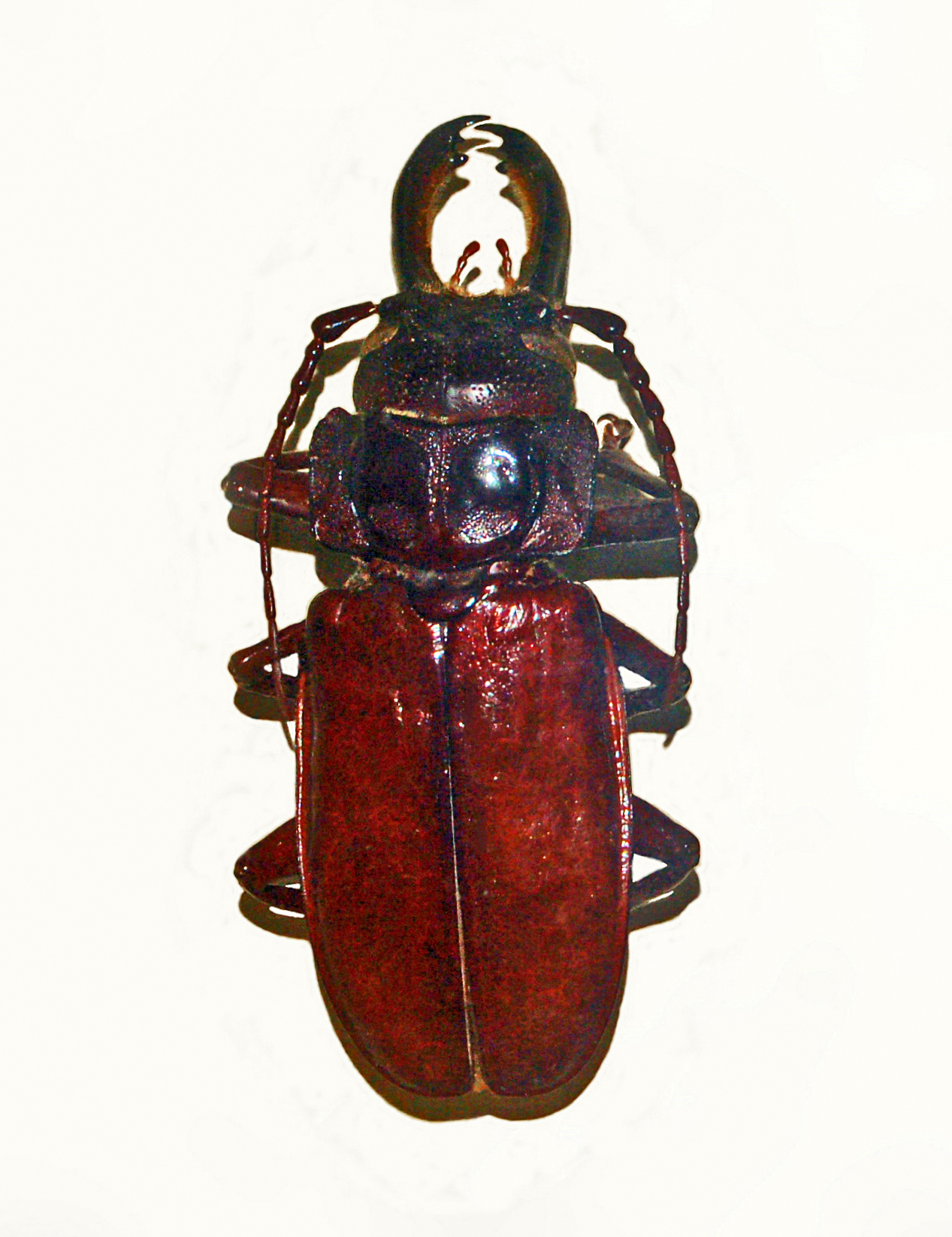 Mallodon downesi from São Tomé and Príncipe